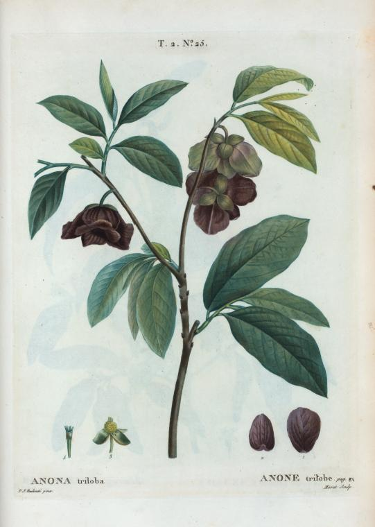 Anona triloba = Anone tritobe.